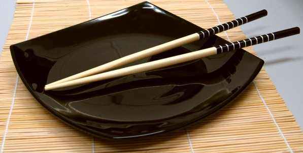 Chopsticks